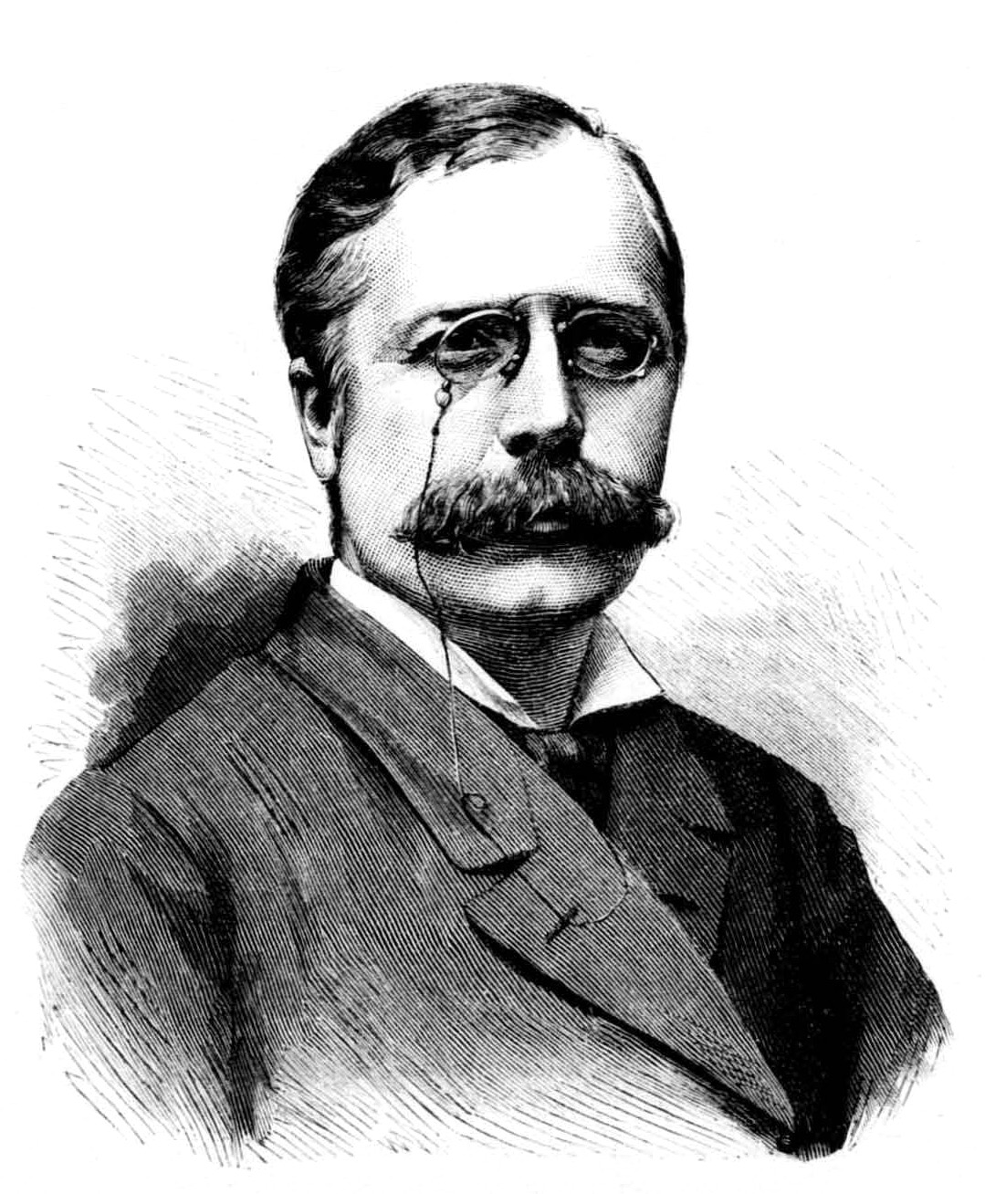 August Körling (1842-1919)